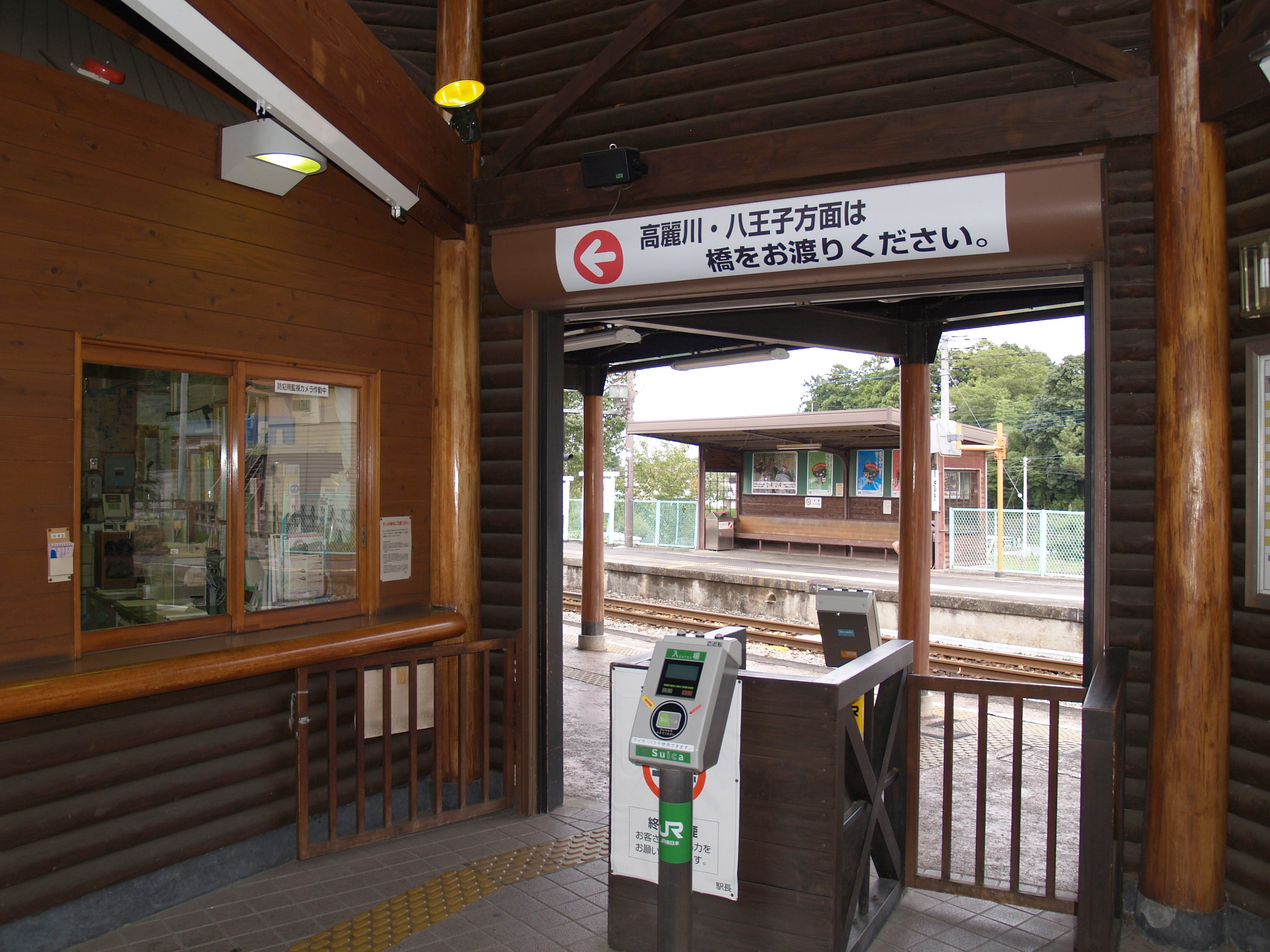 明覚駅改札口